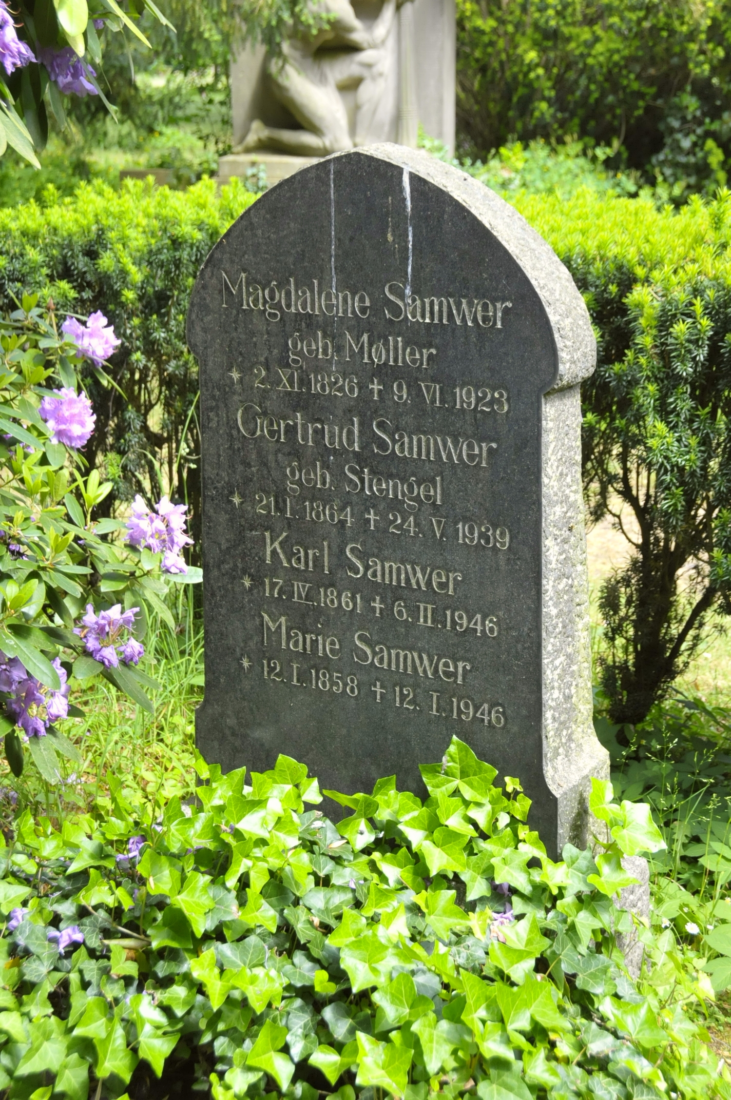 Grabstein der Familie Samwer auf dem Hauptfriedhof Gotha